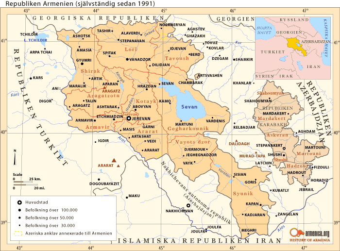 Administrativní dělení Arménie v roce 1991